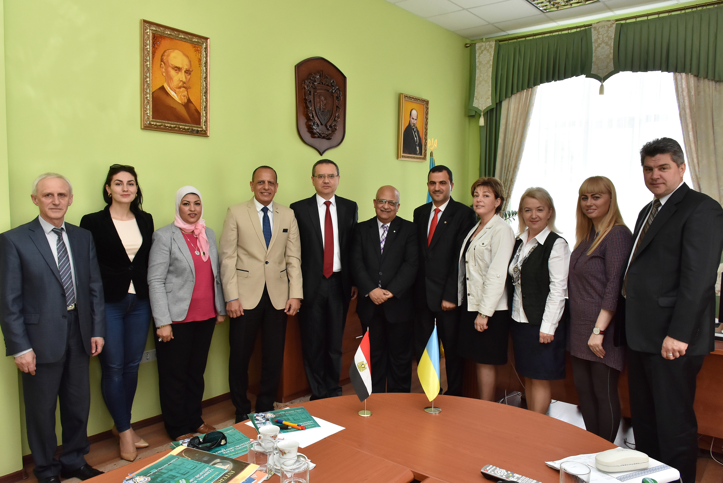 Делегація університету з міста Мансура (Єгипет) в Тернопільському державному медичному університеті імені І. Я. Горбачевського. Справа наліво: проректор з наукової роботи ТДМУ, професор Іван Кліщ, заступник директора ННІ медсестринства ТДМУ Світлана Даньчак, декан факультету медсестринства Мансурського університету, професор Аміна Махмуд Ель-Немер, Віце-президент Мансурського університету, професор Закі Мохамед Зейдан, ректор ТДМУ Михайло Корда, професор кафедри фармацевтичної хімії фармацевтичного факультету Мансурського університету Хусейн Ібрагім Ель-Субах, керівник відділу міжнародної співпраці Мансурського університету, професор Мохамед Салах, директор ННІ медсестринства ТДМУ Світлана Ястремська, керівник відділу міжнародних зв’язків ТДМУ Наталія Лісничук, невідома, декан фармацевтичного факультету ТДМУ Дмитро Коробко.